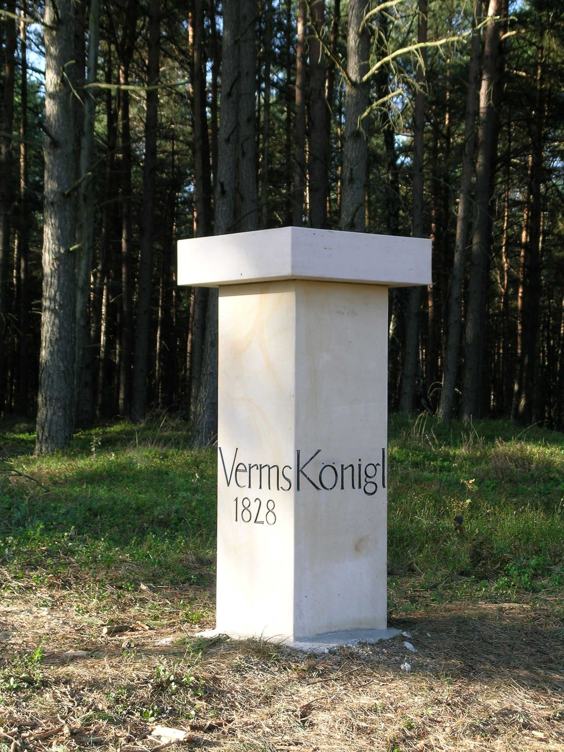 2005 neu errichteter Gaußstein auf dem Haußelberg, ein Punkt auf dem Heidschnuckenweg Newly erected trig point on the Haußelberg, Lüneburg Heath, Lower Saxony, Germany.